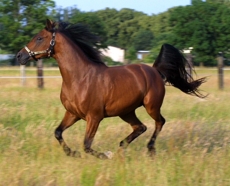 Arabisches Vollblut(Pernod Al Ariba OX) im Galopp mit typischer, hoher Schweifhaltung